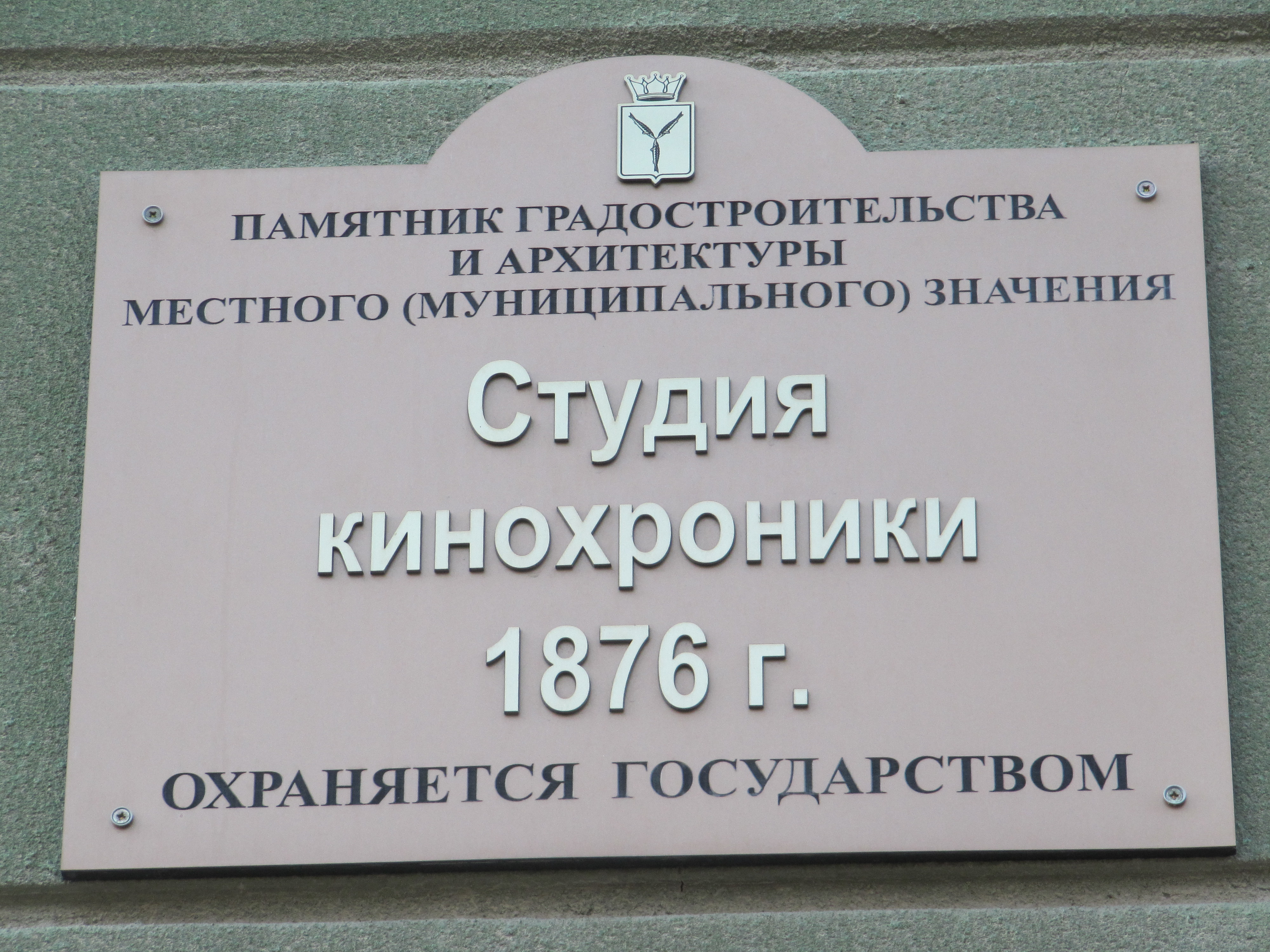 Дом кино. Студия кинохроники. 1876. Ул. Октябрьская 43. Саратов